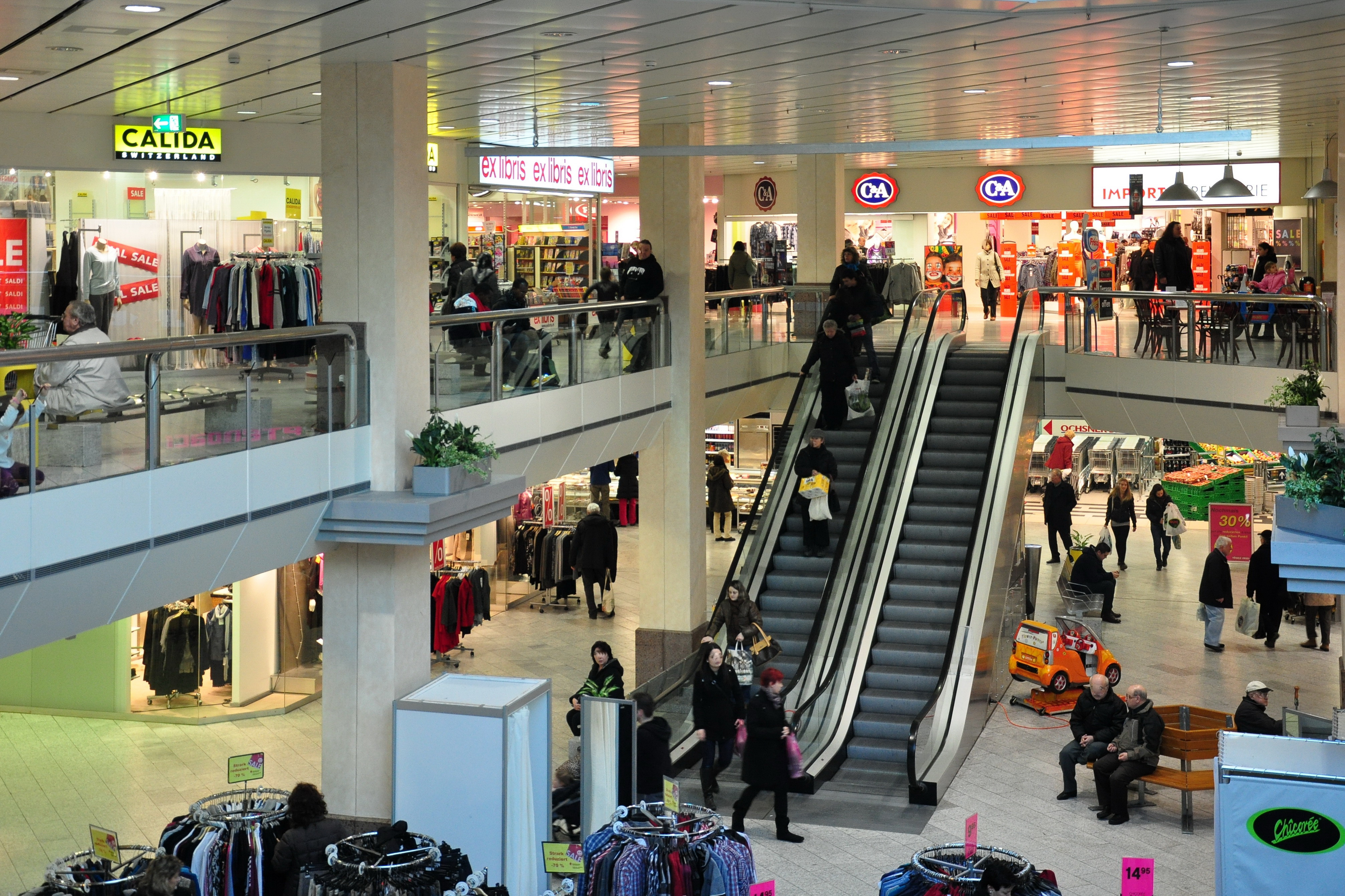 Sonnenhof in Rapperswil (Switzerland)